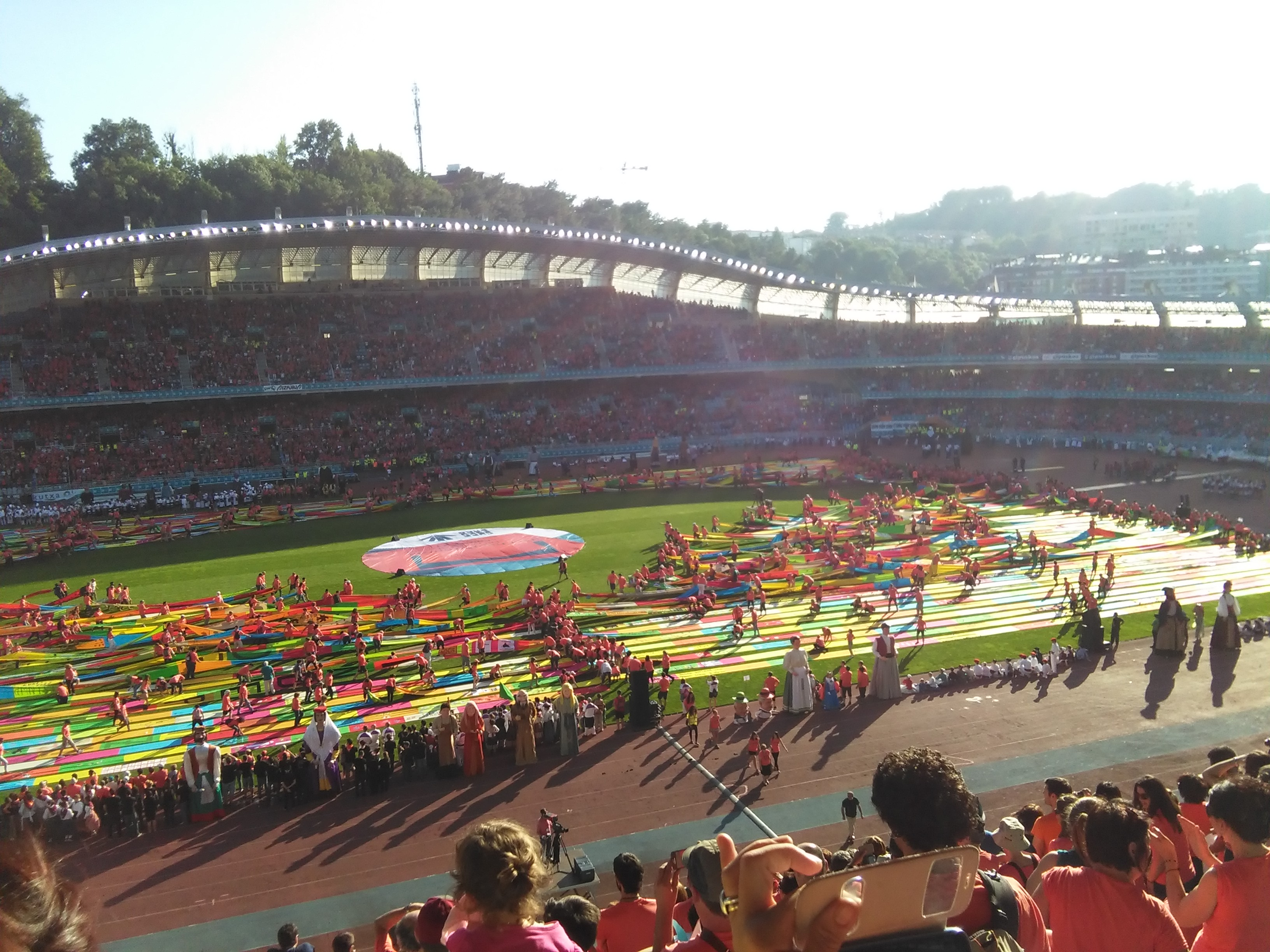 2015eko ekainaren 21ean egindako Anoetako ekitaldia